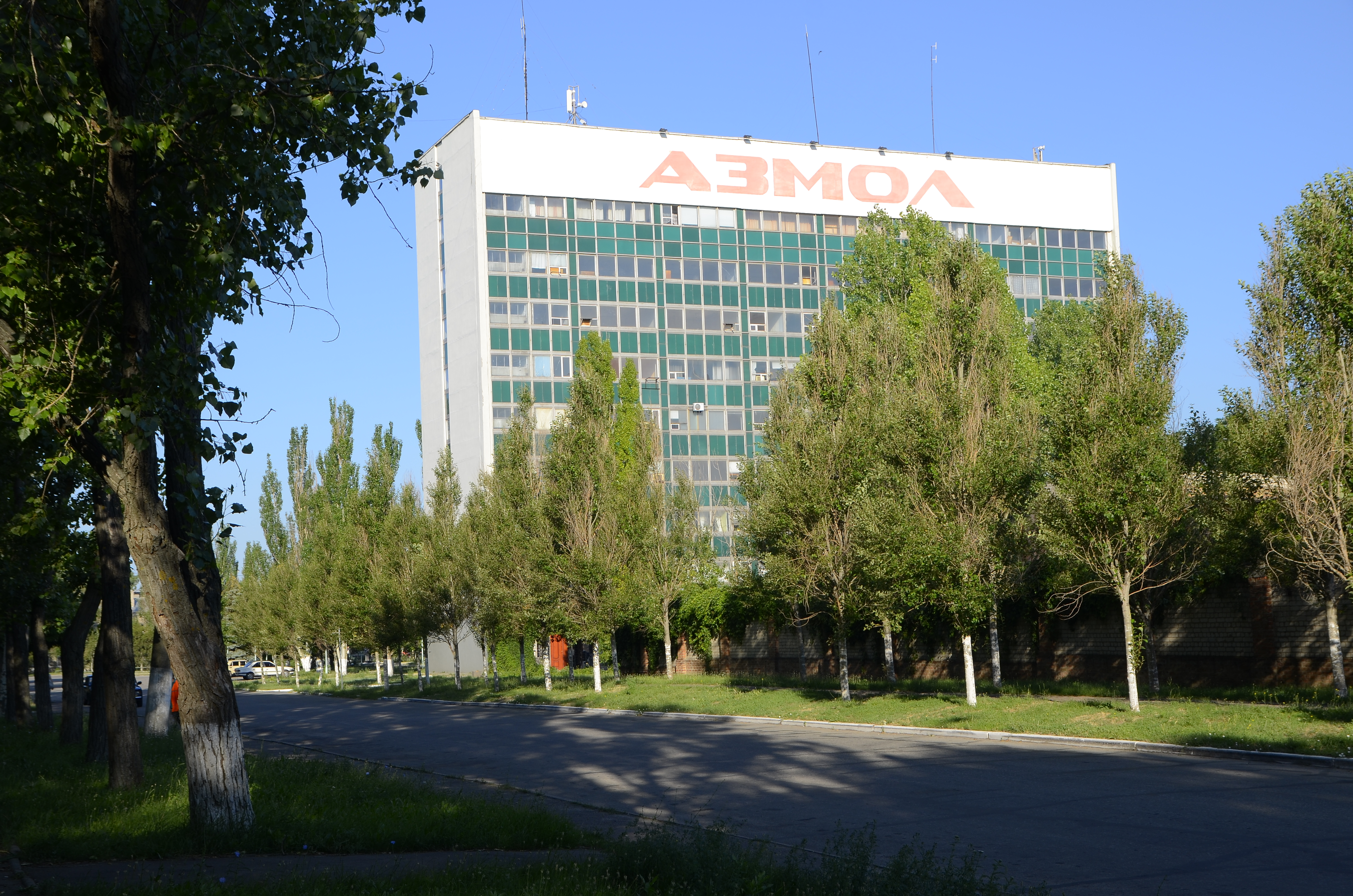 Бердянск